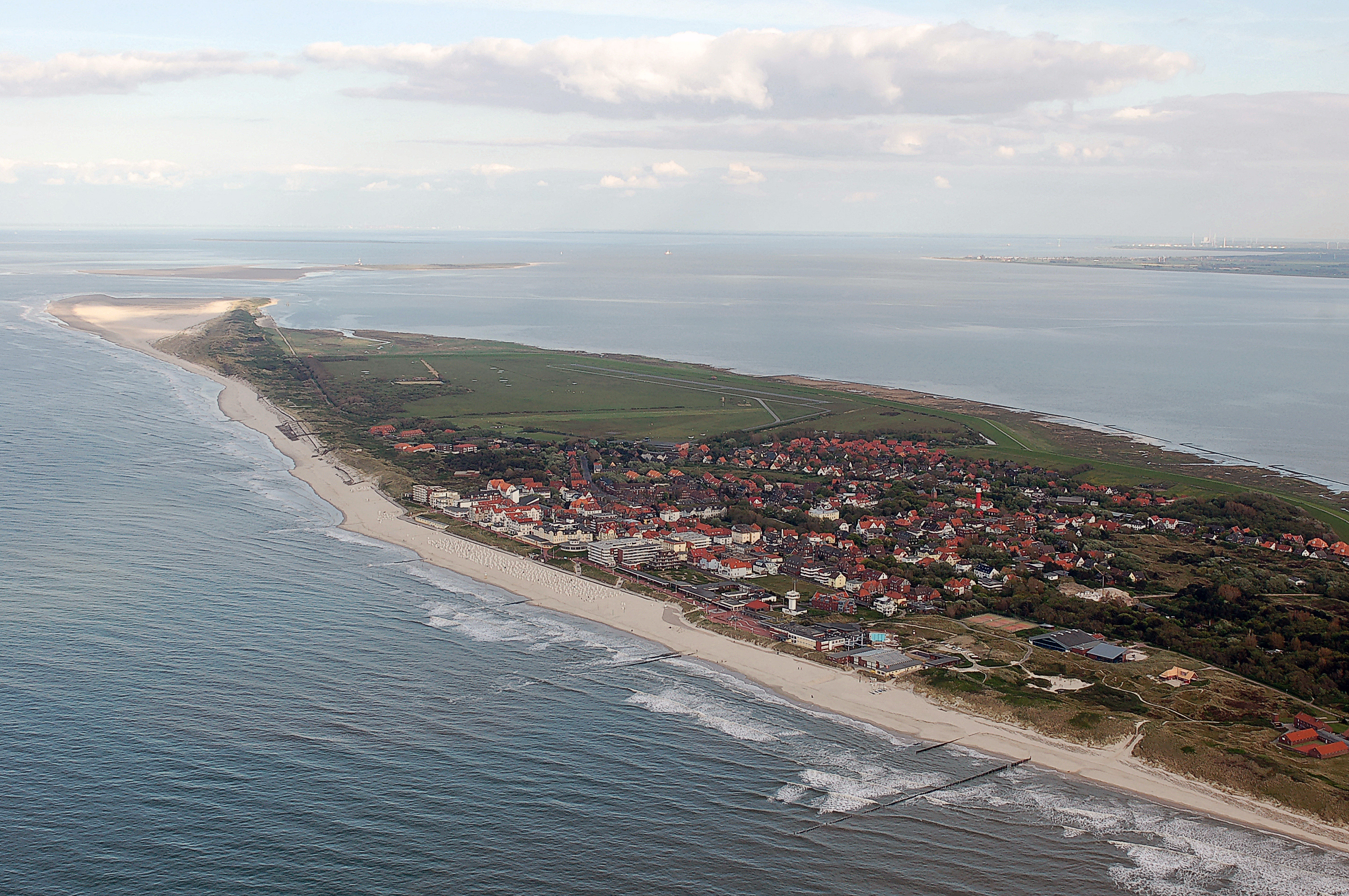 Luftbilder von der Nordseeküste 2012-05: Wangerooge